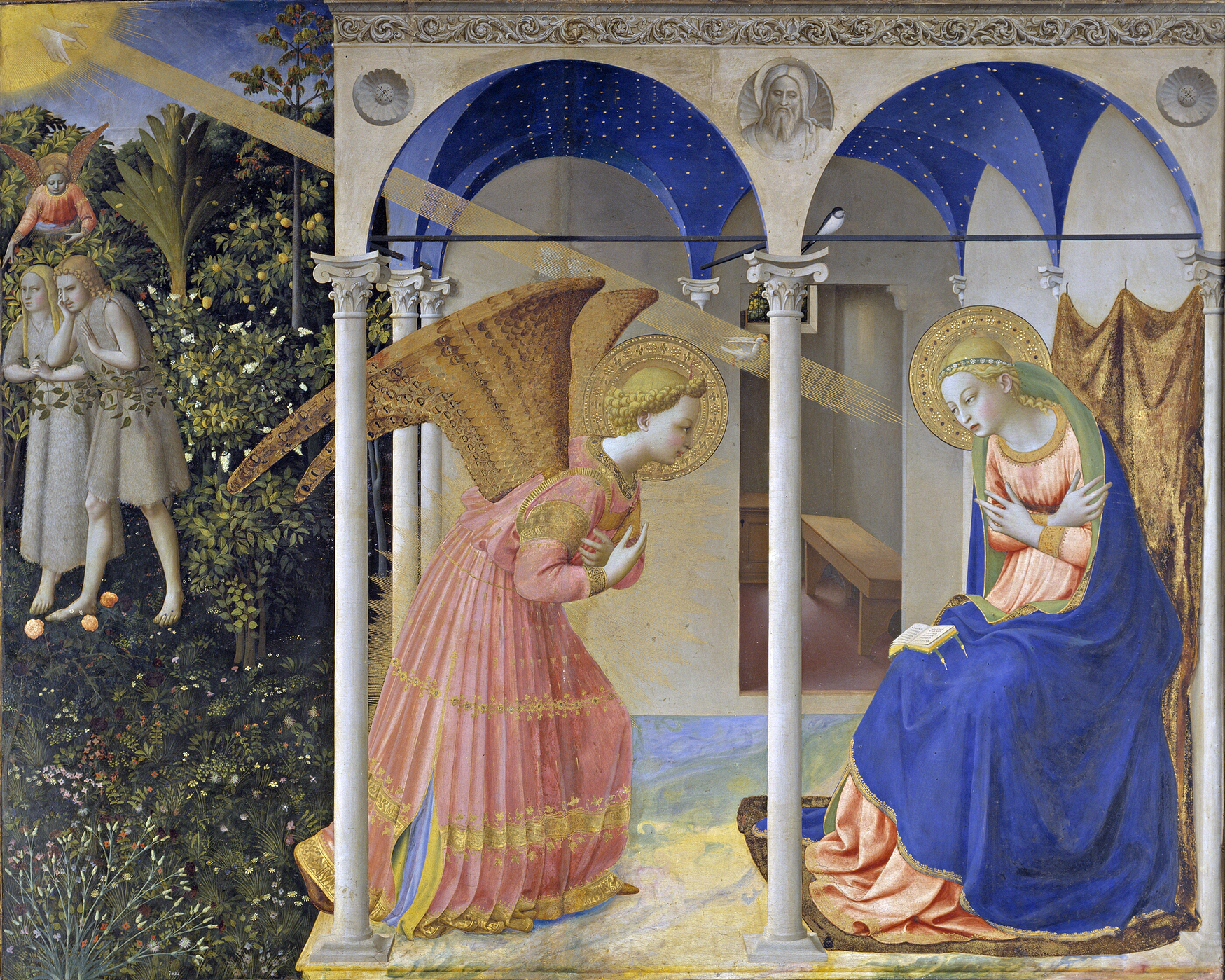 La Anunciación del Prado es considerada actualmente una de las primeras obras maestras de su autor. Iconográficamente se trata de una obra tradicional cuya tabla central muestra el ciclo de la pérdida (Adán y Eva expulsados del Paraíso) y salvación del hombre (Anunciación de María), mientras los cinco paneles de la predella ilustran otros tantos episodios de la vida de la Virgen. Sin embargo, en la plasmación visual de estos temas Fra Angelico demostró conocer las transformaciones que estaban sucediéndose en el arte toscano. Así, la minuciosidad en la representación de flores y objetos deriva de Gentile da Fabriano, responsable también de la voluntad de unificar el espacio mediante la arquitectura; mientras el intento de profundidad espacial de la camera virginis remite a cuanto habían hecho Masolino y Masaccio en la Capilla Brancacci. De igual modo, la estructura que cobija La Anunciación fue de las primeras en seguir la recomendación dada en 1425 por Brunelleschi para los retablos de San Lorenzo, que debían ser cuadrados y sin adornos. Todo ello no puede hacernos olvidar que estamos ante una obra temprana que, como tal, delata los titubeos de su autor, perceptibles en el deficiente manejo de la perspectiva y el escaso conocimiento de la anatomía (Texto extractado de Falomir, M.: Pintura italiana del Renacimiento. Guía, Museo del Prado, 1999, p. 32).